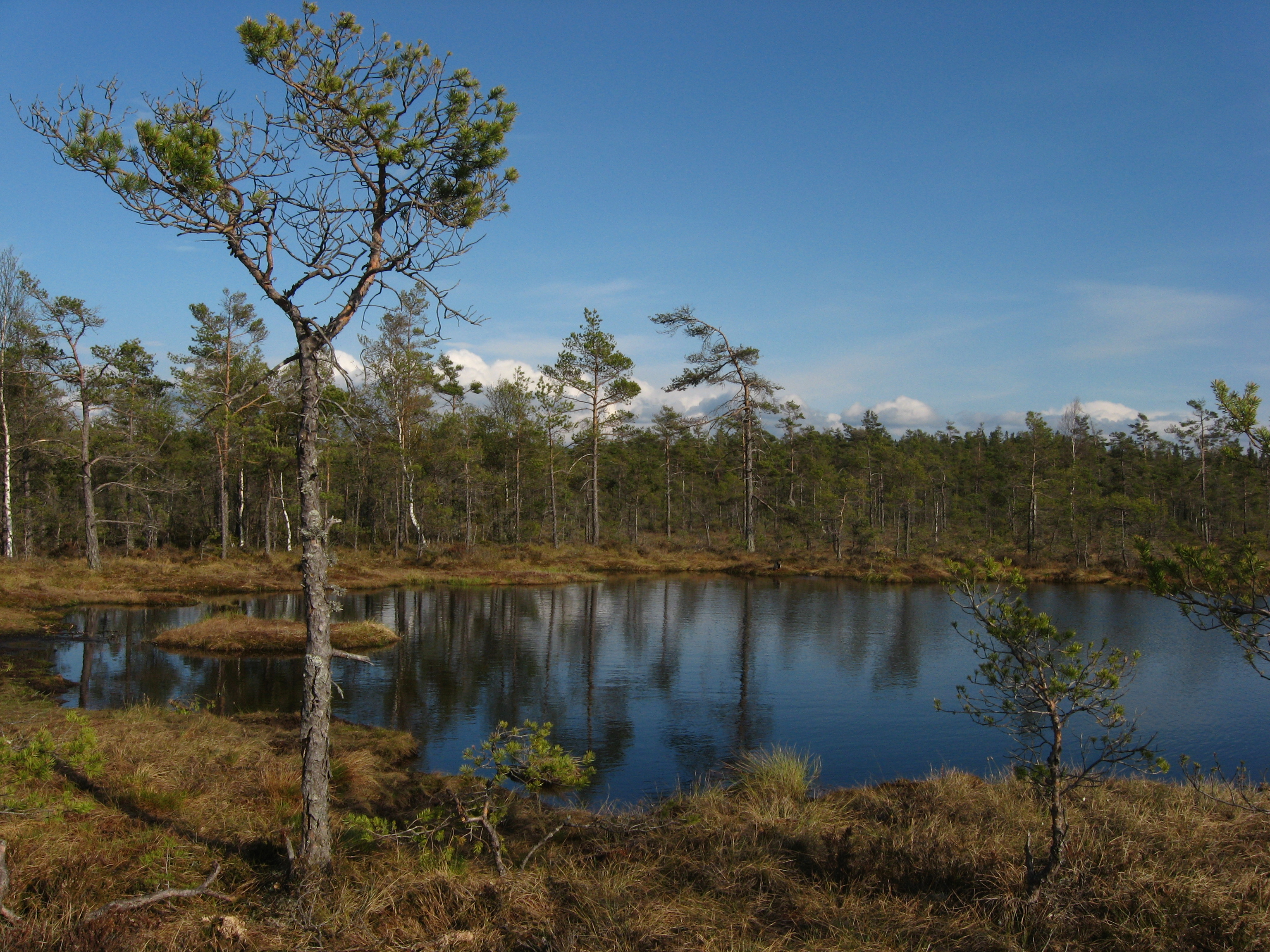 Švédská bažina Dumme mosse.